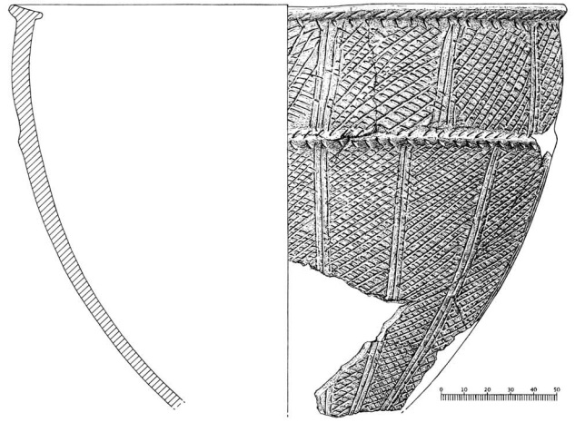 Vaso neolitico de la Foz de los Cavios. Piloña - Asturias. IV milenio a.C.